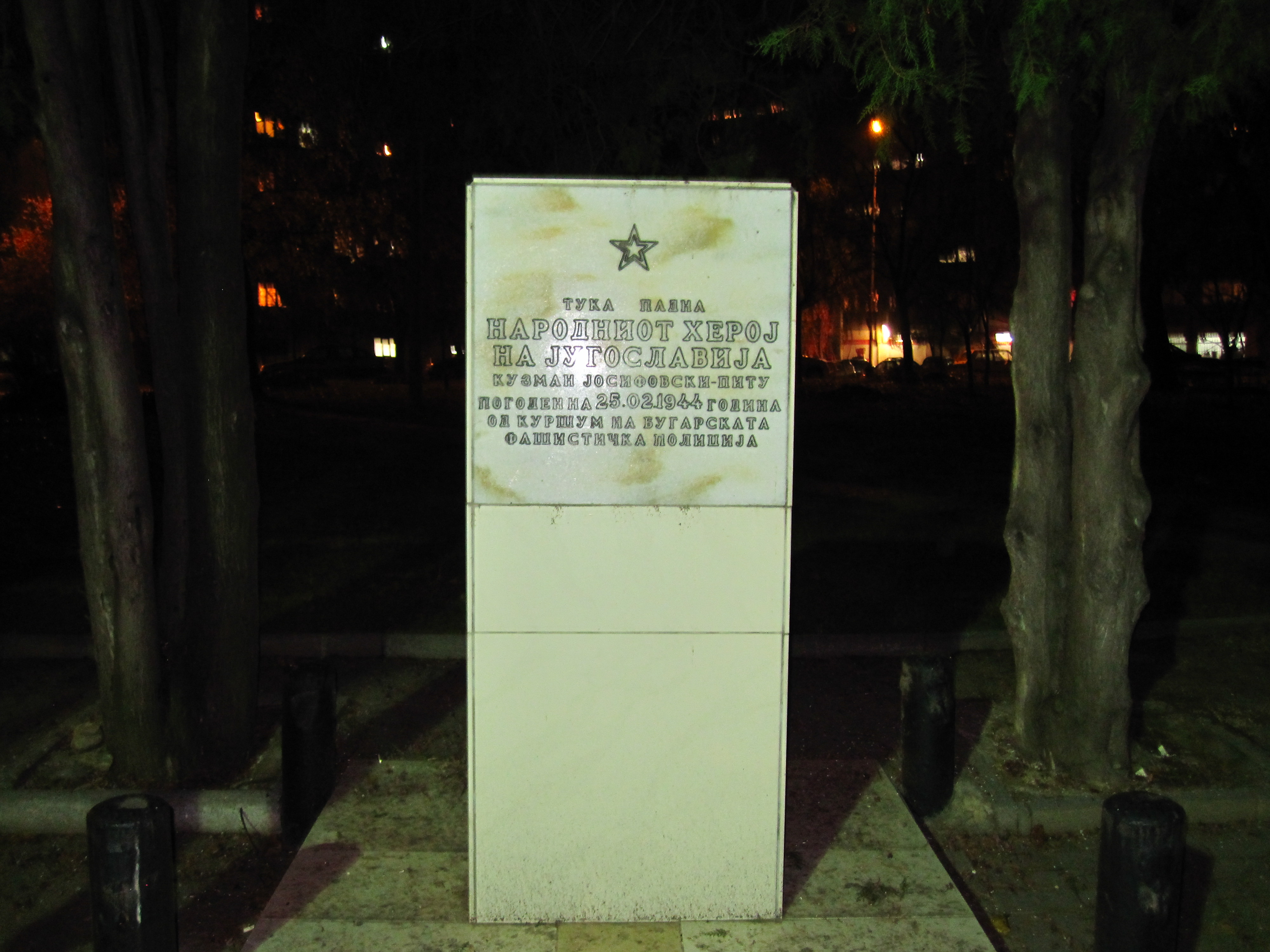 Кузман Јосифовски - Питу (Прилеп, 23 јуни 1915 - Скопје, 25 февруари 1944) бил македонски правник, комунист, еден од главните организатори на антифашистичкото движење (1938-1941) и на НОБ во Македонија (1941-1944).